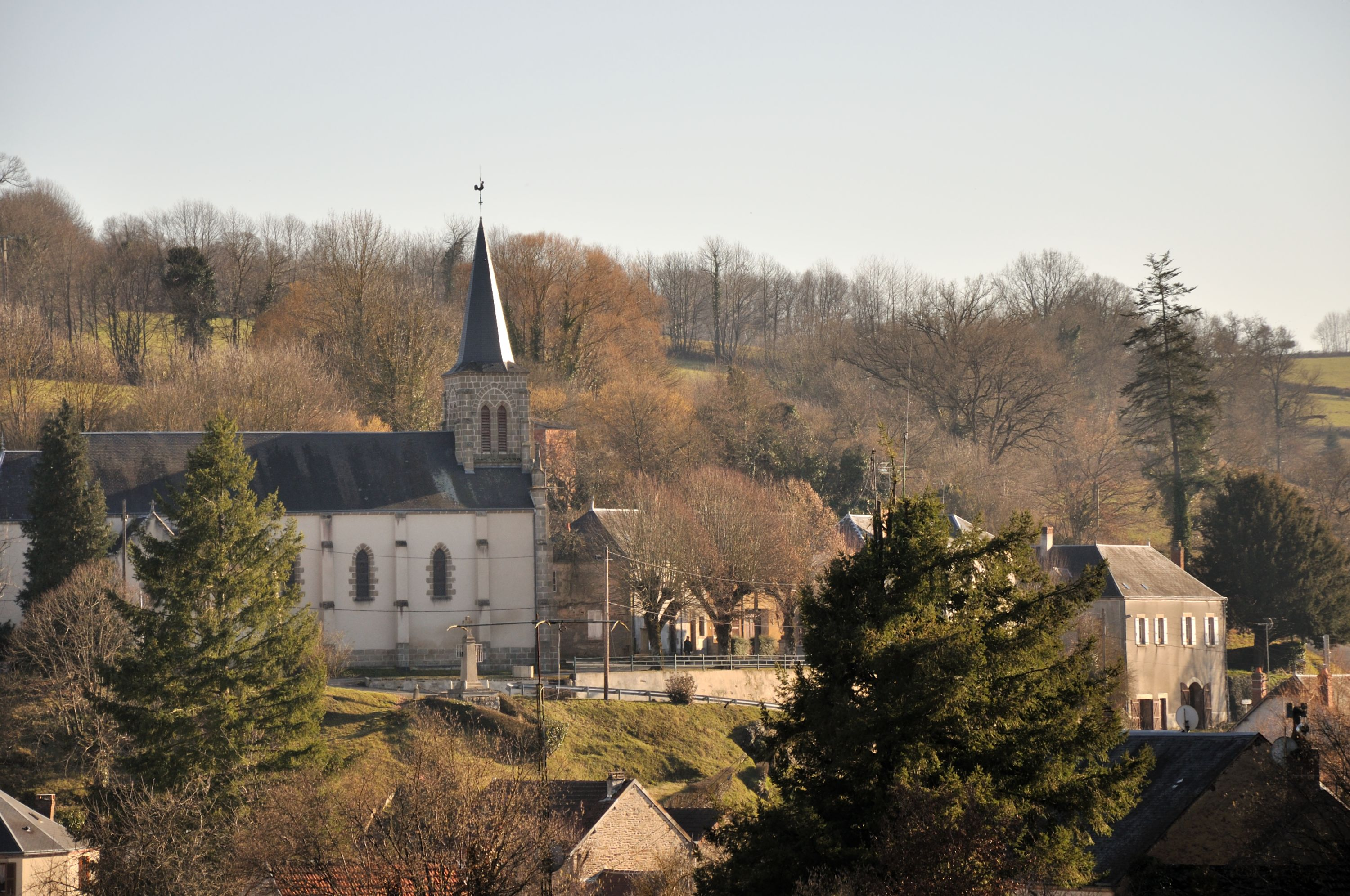 Crozon-sur-Vauvre (Indre) - Le Bourg